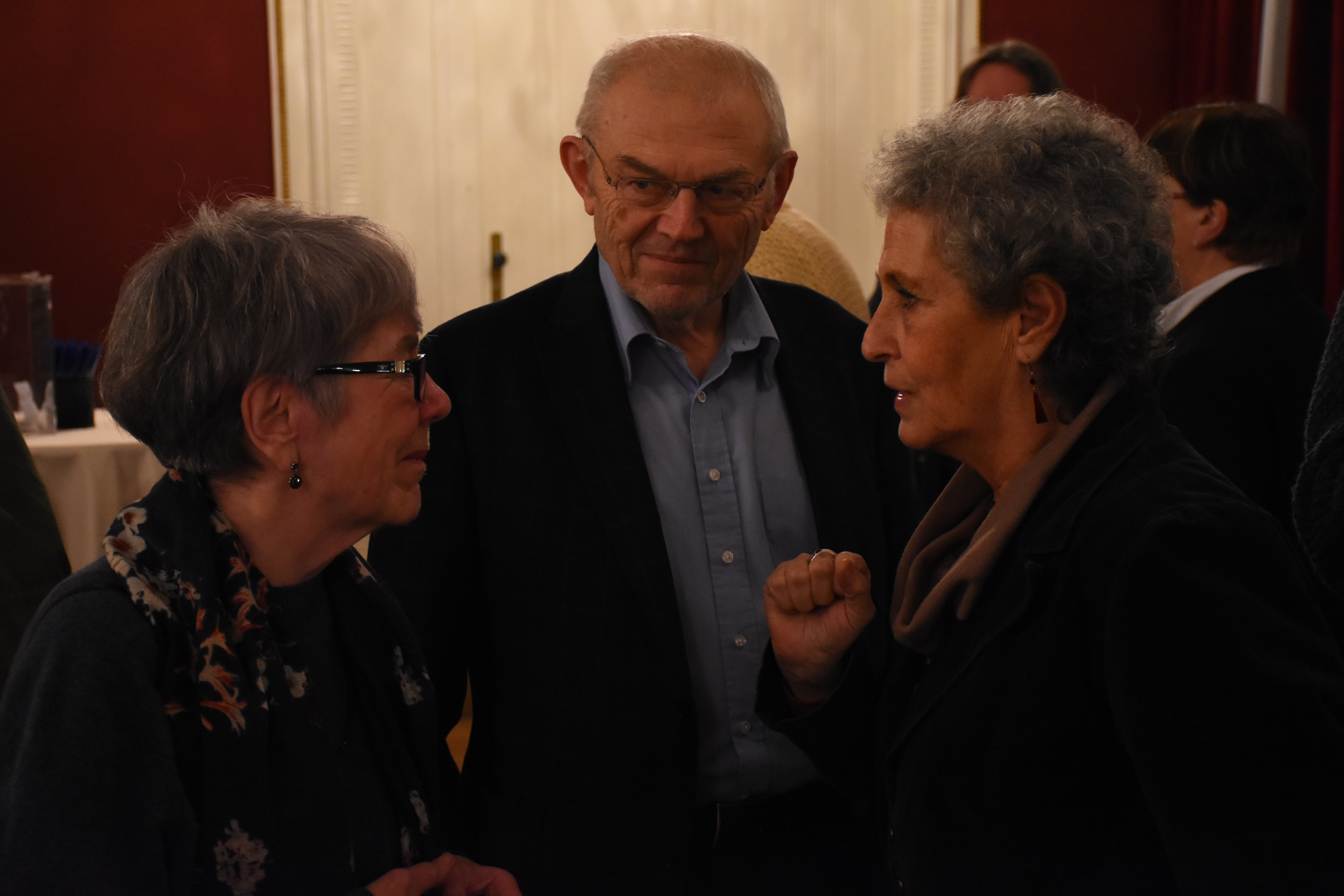 Setkání signatářů k 40. výročí Charty 77, Palác Lucerna, Praha, 7. ledna 2017Barbara Day, Jiří Müller, Věra Roubalová